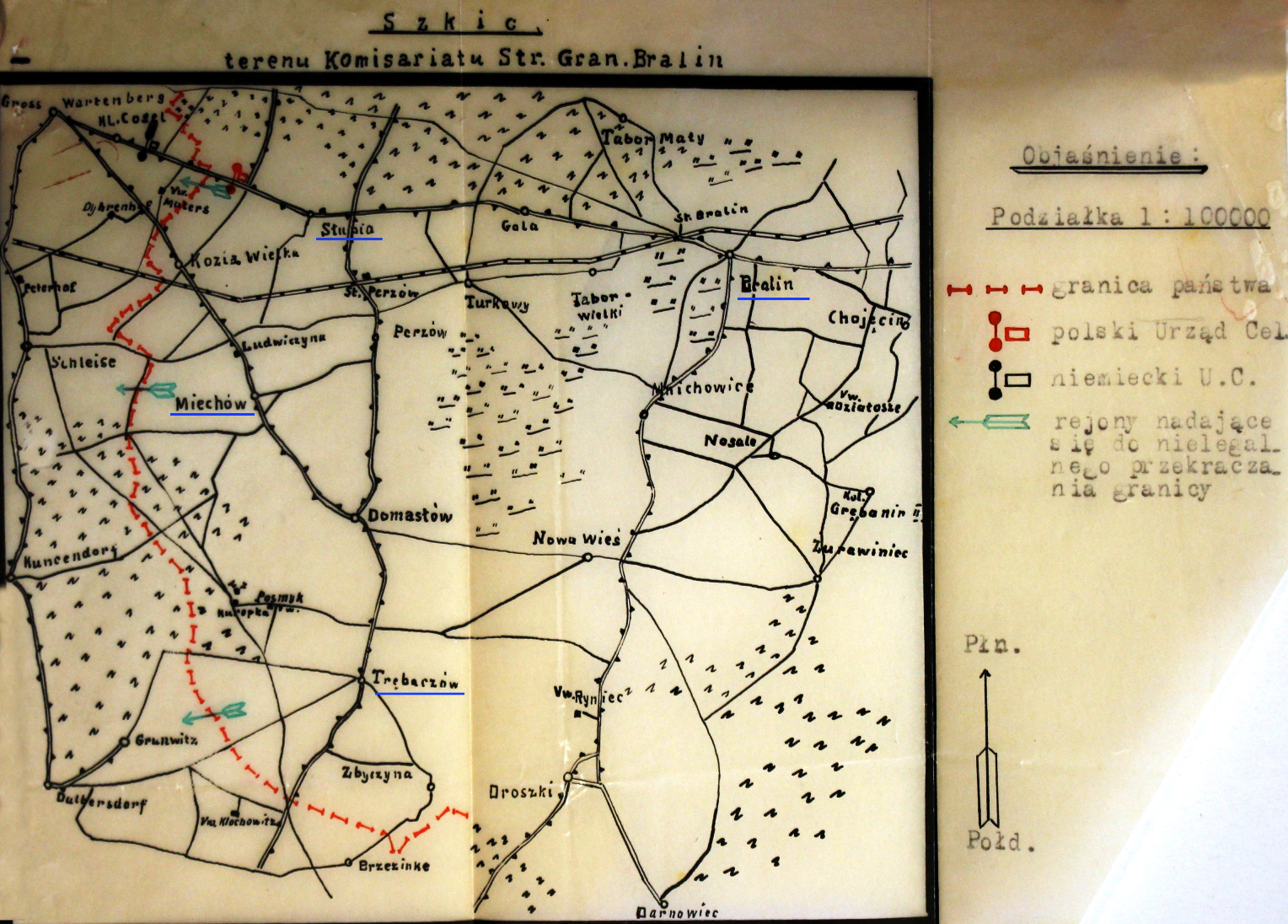 Szkic komisariatu SG Bralin - lata 30. XX wieku